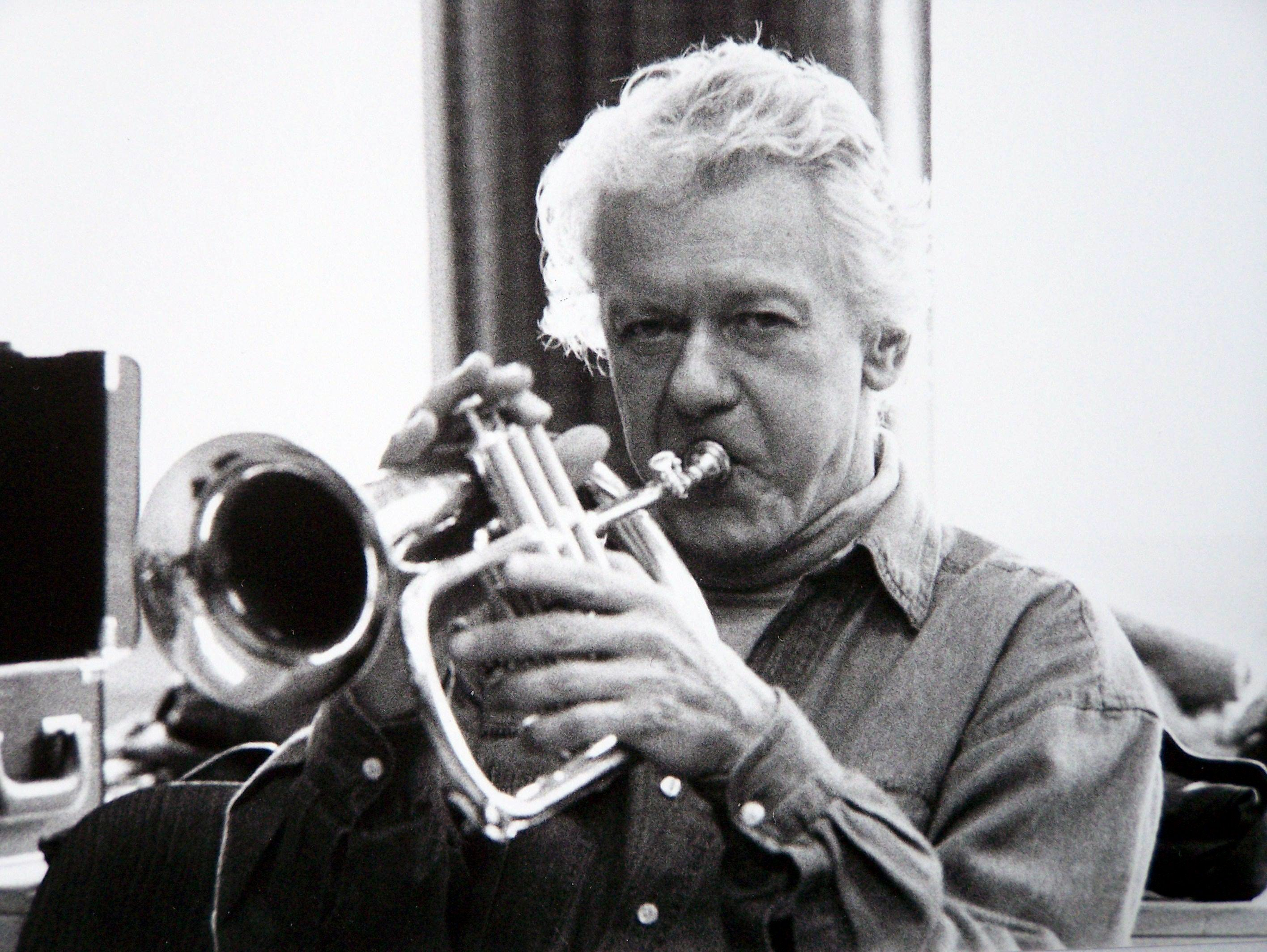 Ack van Rooyen, Dutch trumpet and flugelhorn player Ack van Rooyen aus Den Haag mit seinem Flügelhorn